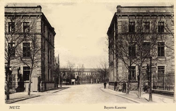 Metz, Bayernkaserne von Innen mit Blick aus dem Tor nach Norden